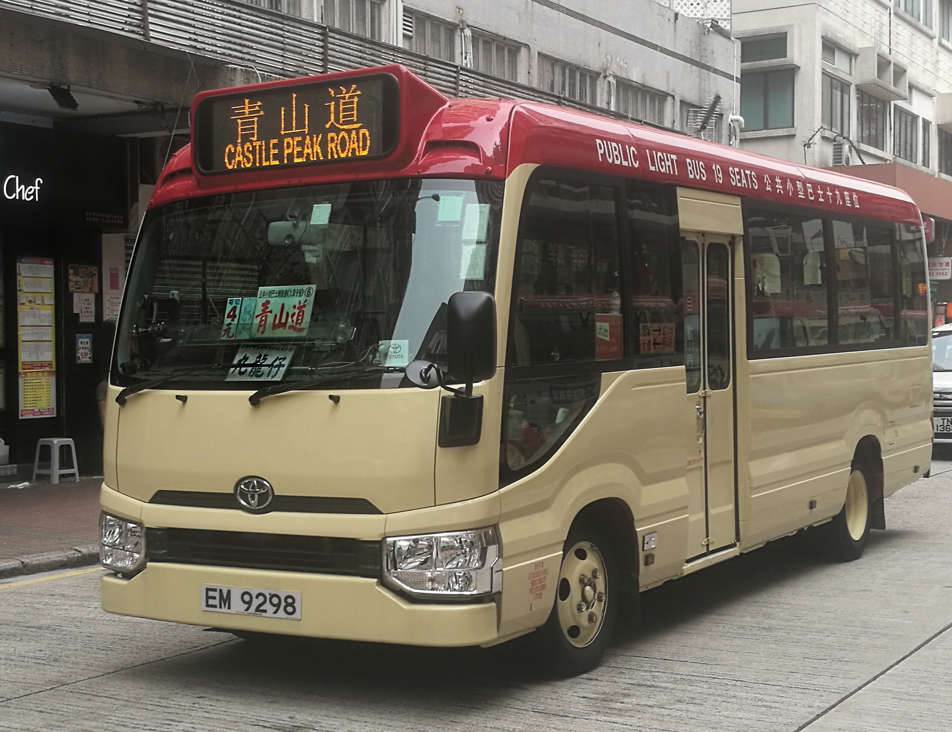 小巴EM9298的照片